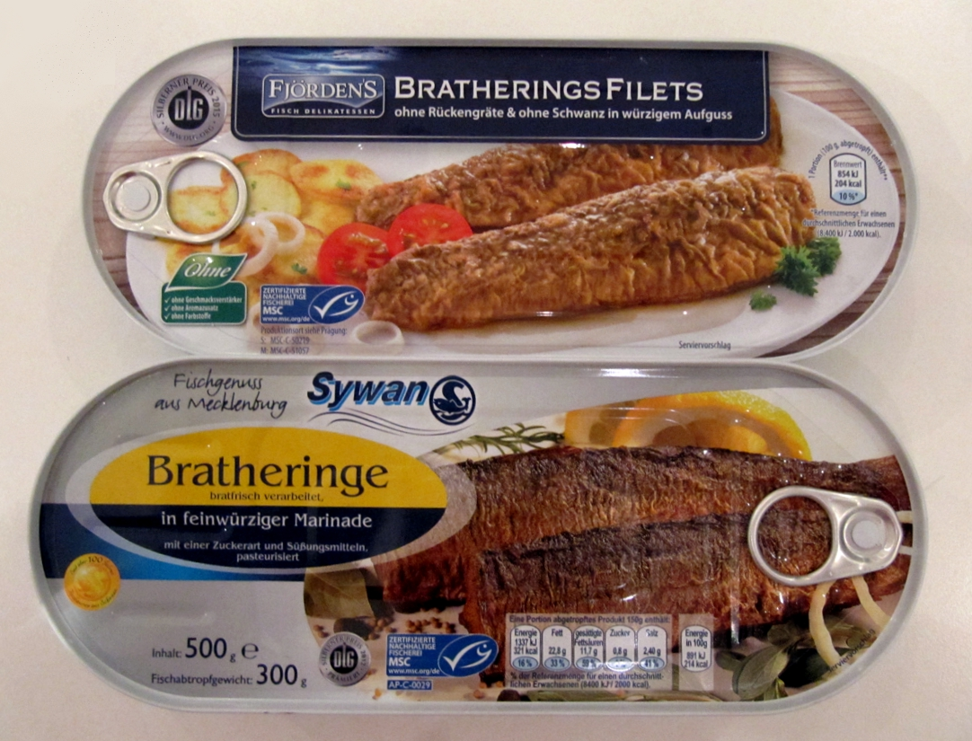 Bratheringsdosen 2